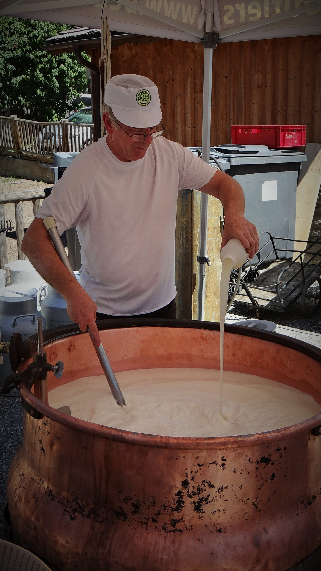 Fabrication traditionnelle du Beaufort par la Coopérative Laitière de Moutiers lors de la fête de l’Alpe et des Guides de Pralognan-la-Vanoise, 17 juillet 2016 ːajout de la présure